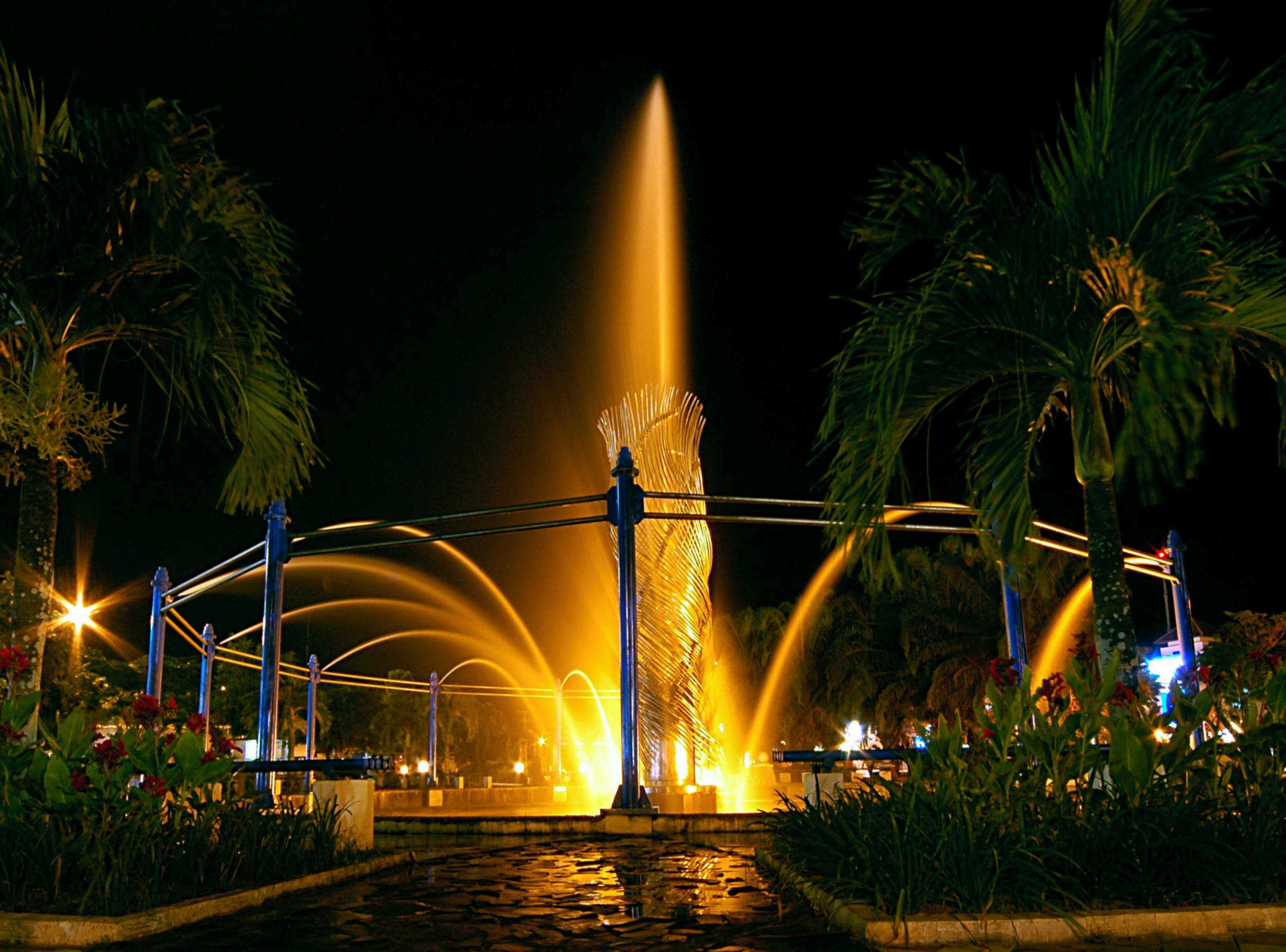 Skyline of Balkipapan